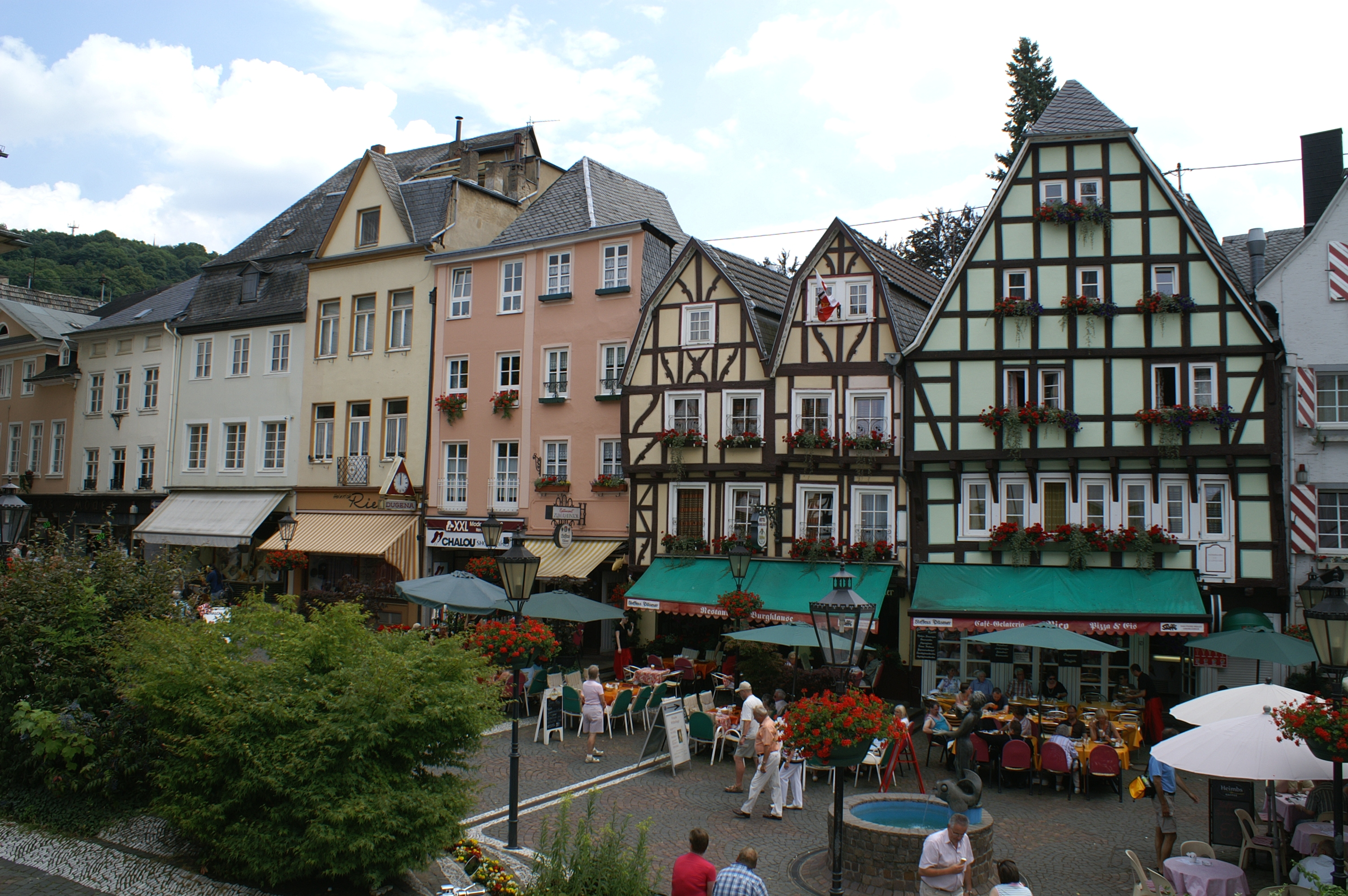 Burgplatz in Linz am Rhein im Landkreis Neuwied